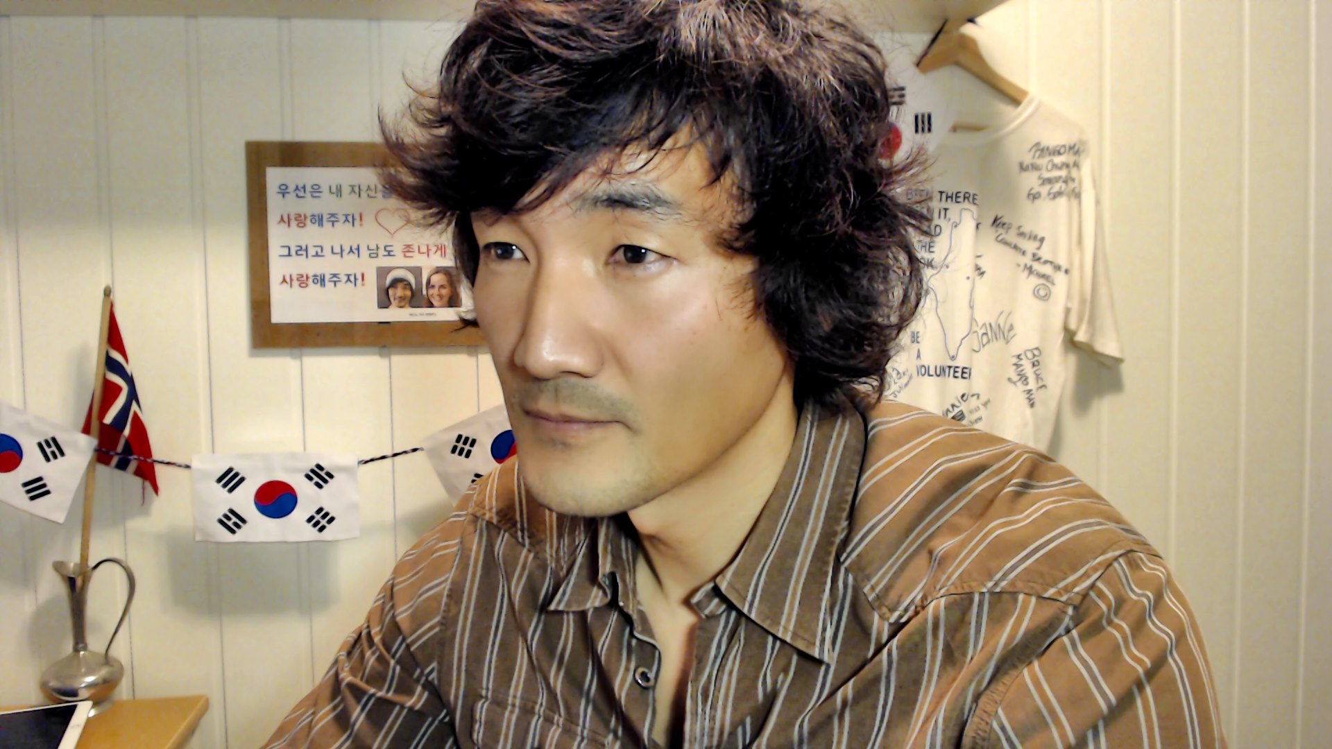 배준표